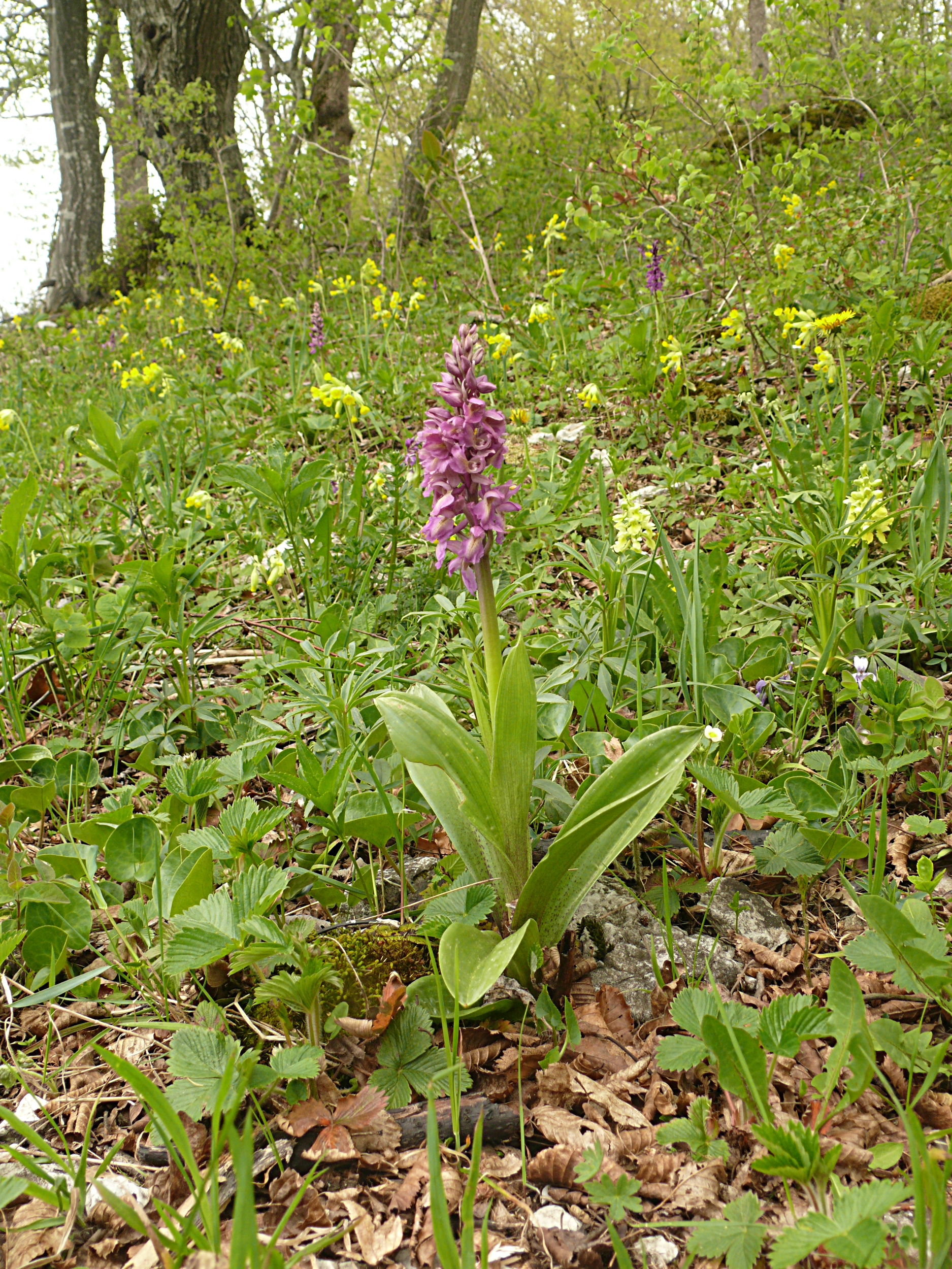 Orchis × hausknechtii mit Orchis mascula und Orchis pallens, Schwäbische Alb